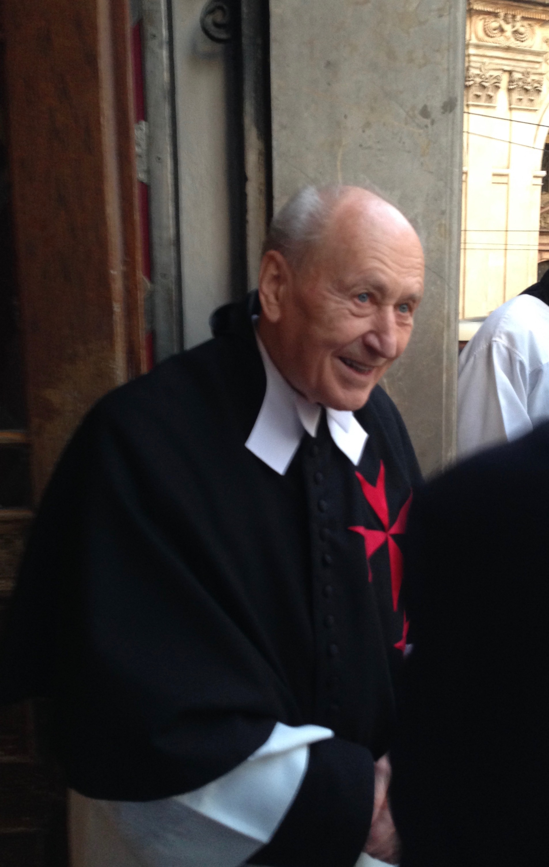 P. Jaroslav Ptáček, OCr., 15/05/2015